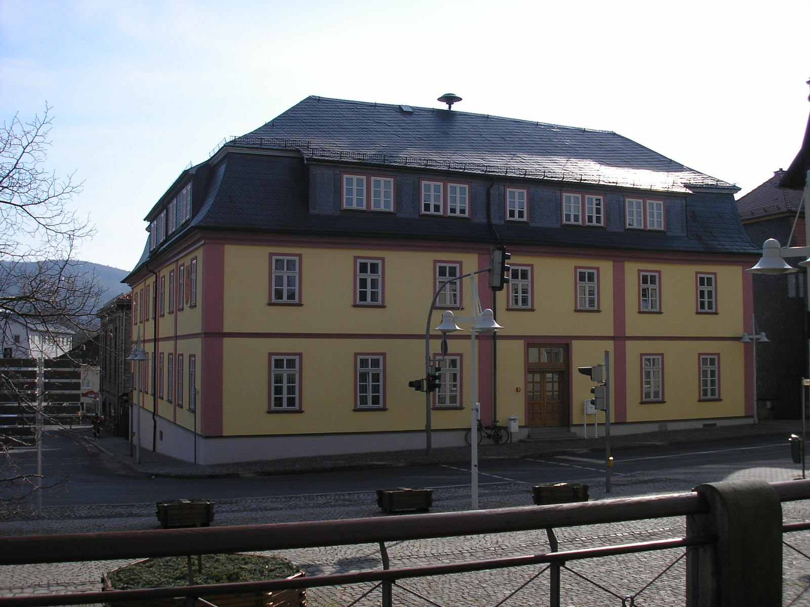 Das Rathaus in Gehren (Thüringen) nach der Sanierung.